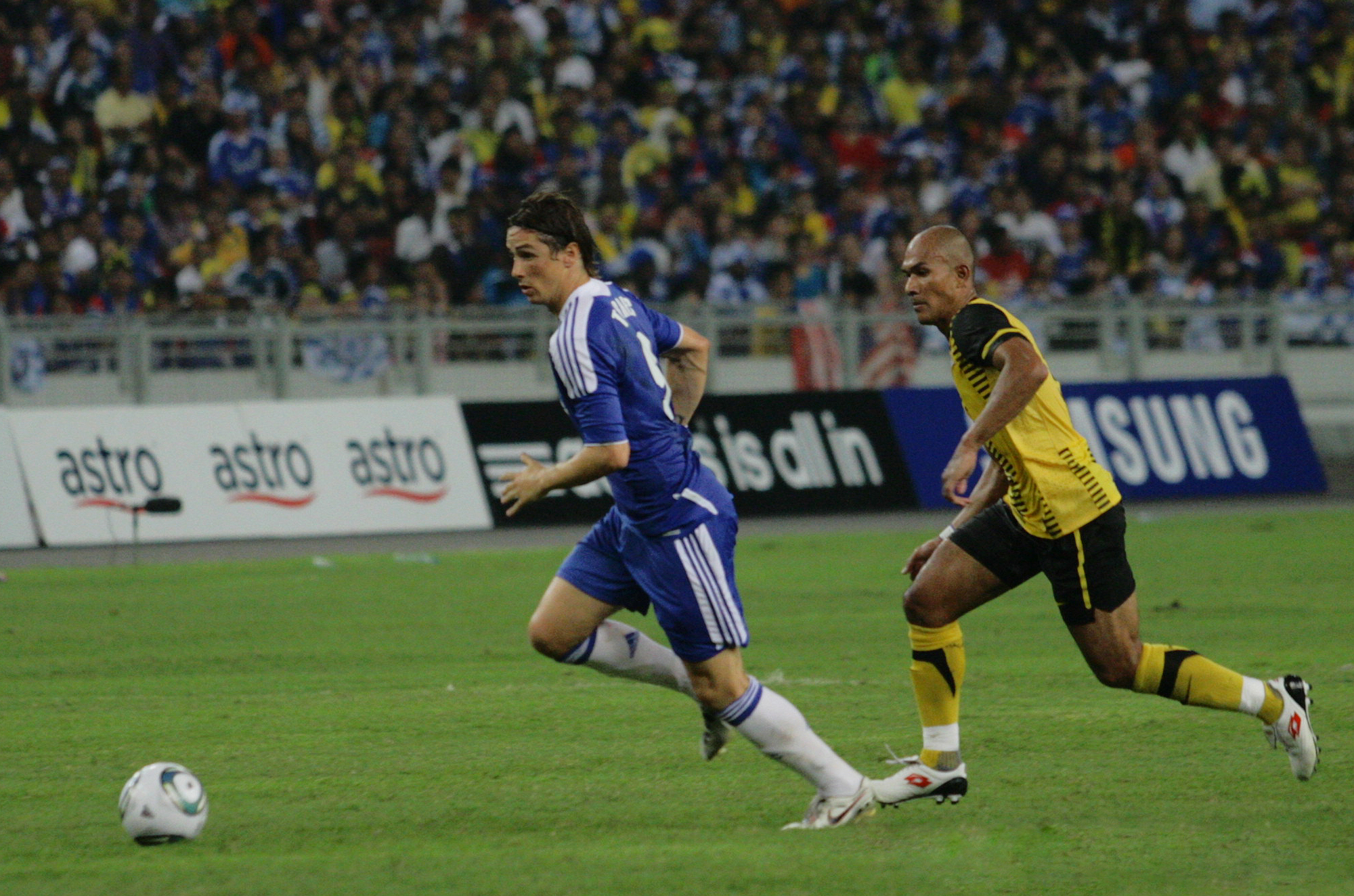 MALAYSIA VS CHELSEA 2011